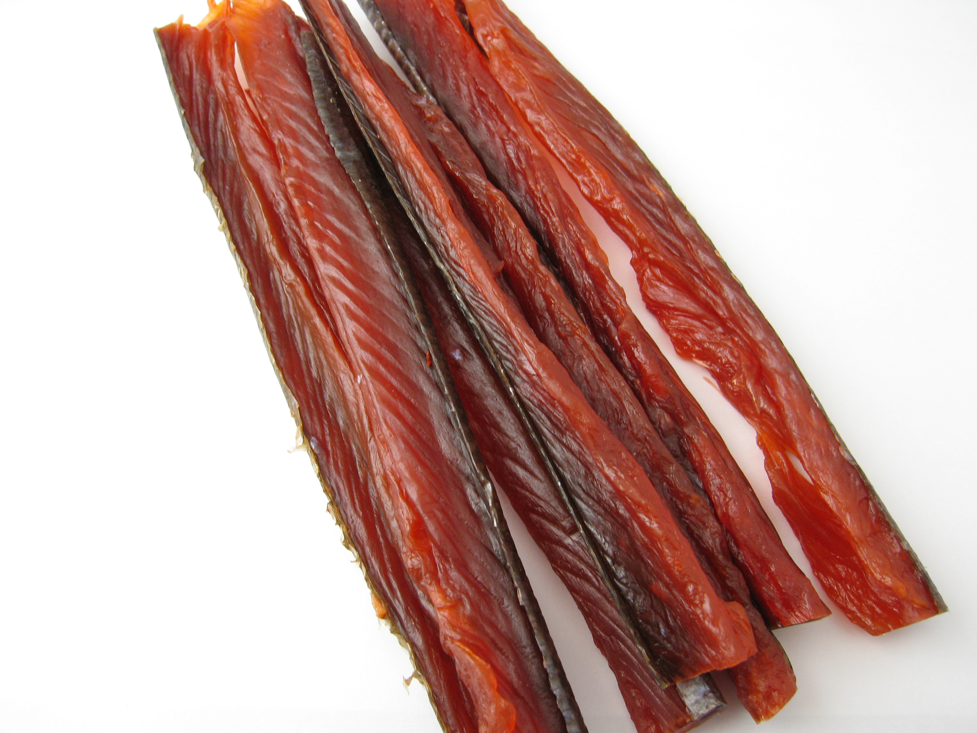 "saketoba" Hokkaido, Japan